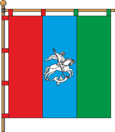 Прапор села Виноградівка (Болградський район)